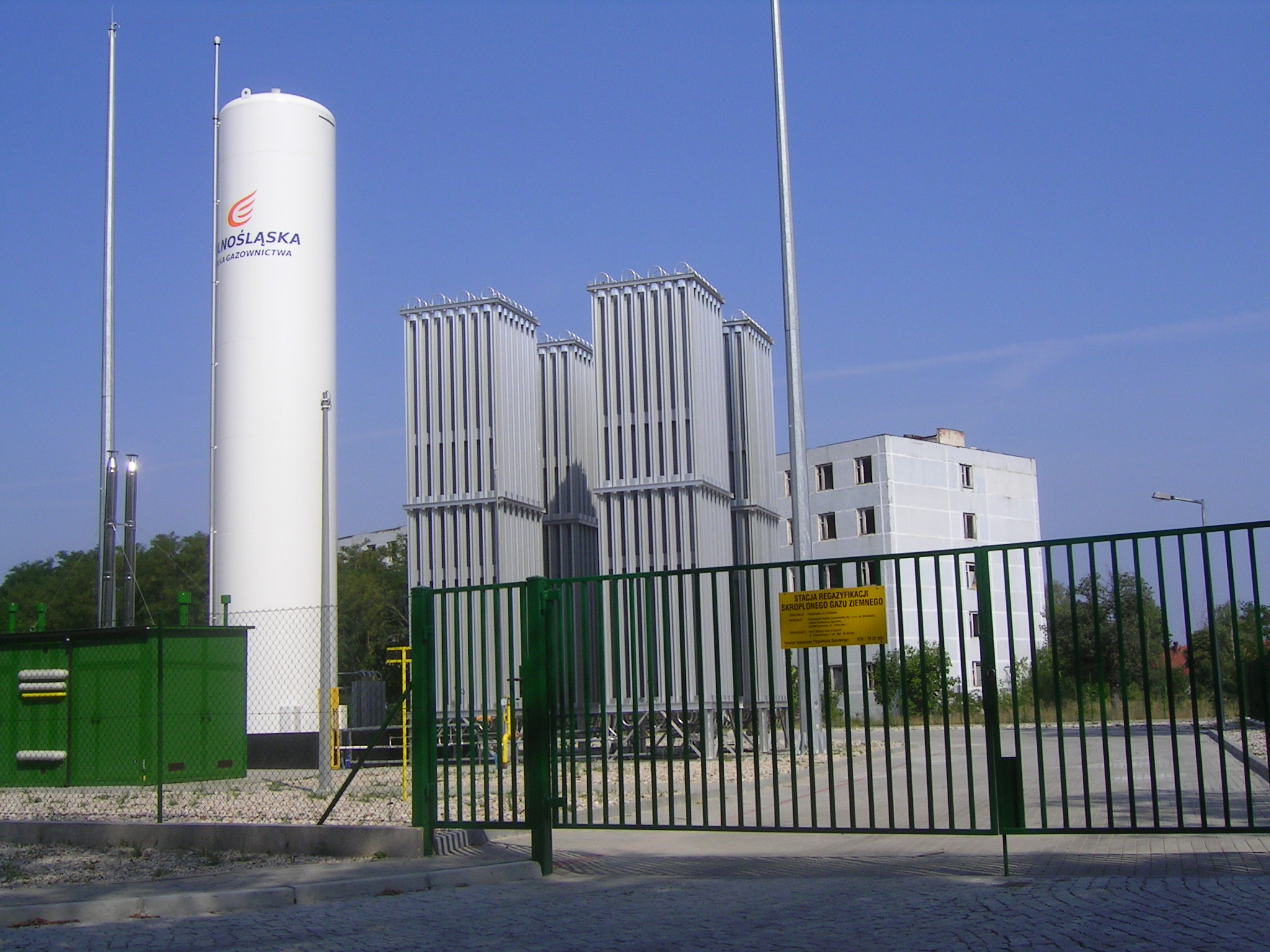 Świętoszów autor: radwa stacja regazyfikacji ciekłego gazu ziemnego